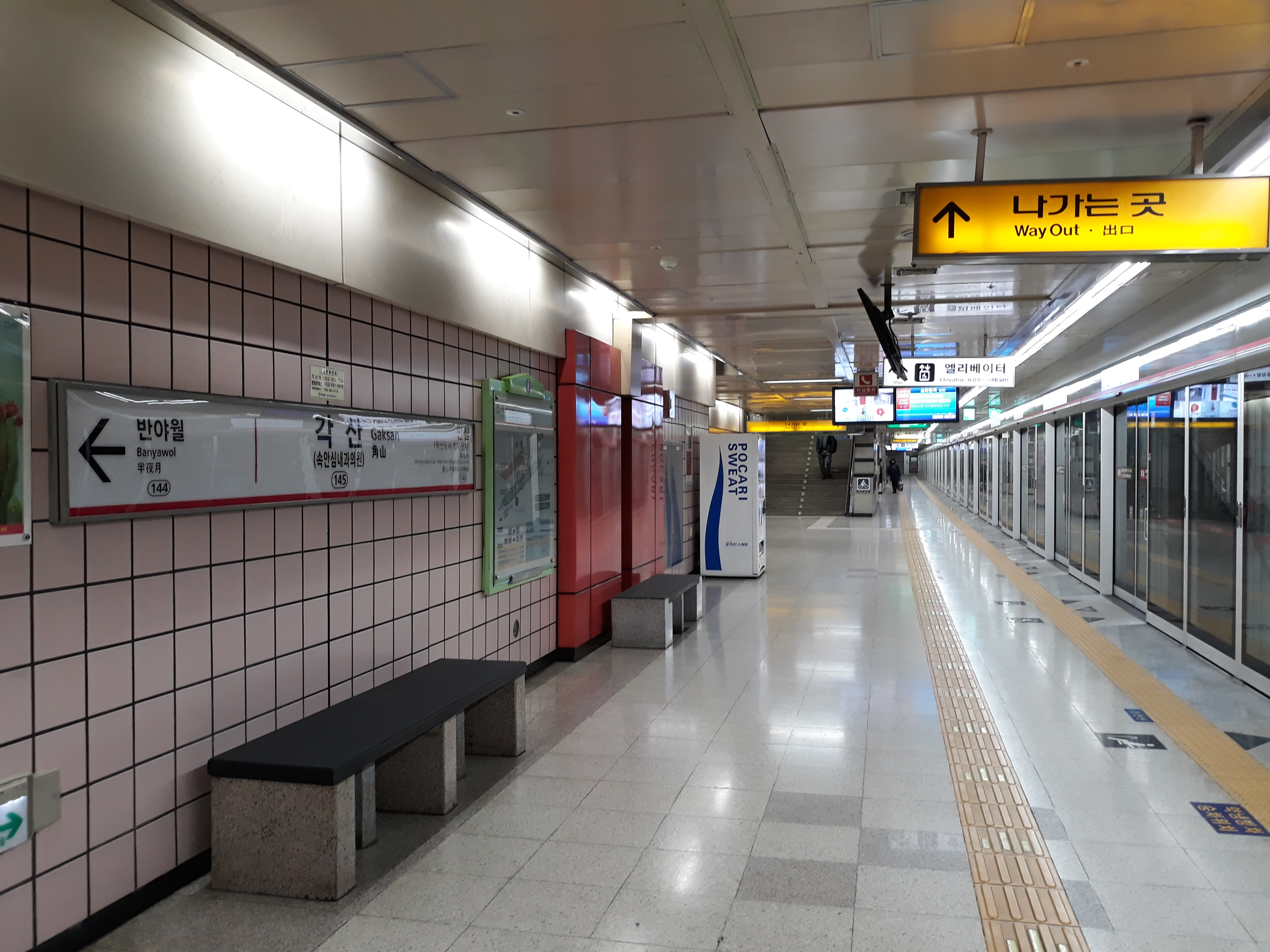 대구 도시철도 1호선 각산역 설화명곡 방면 승강장